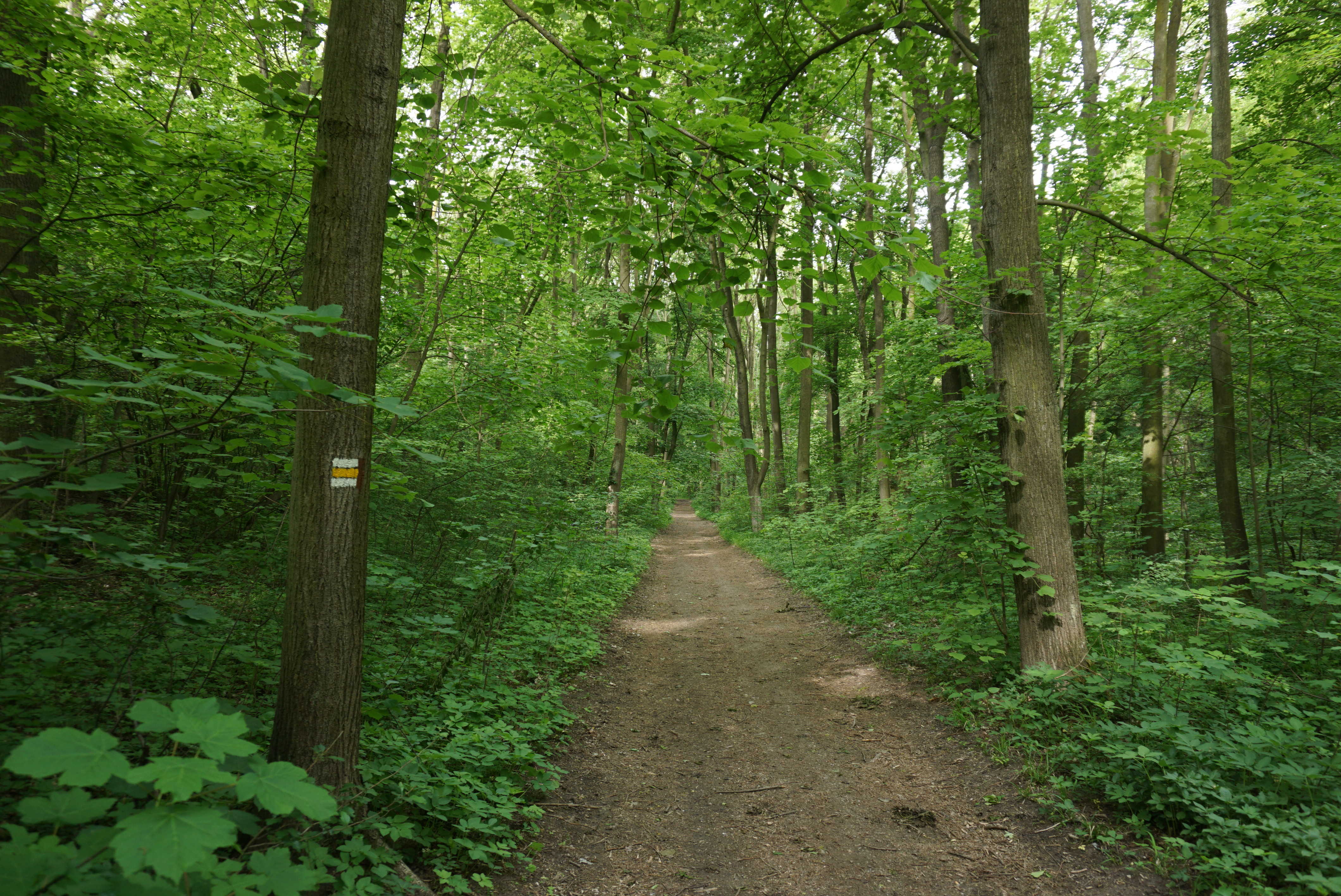 Přírodní památka Smečno